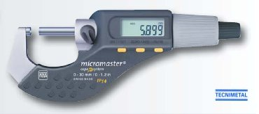 Micrometro de exteriores digital